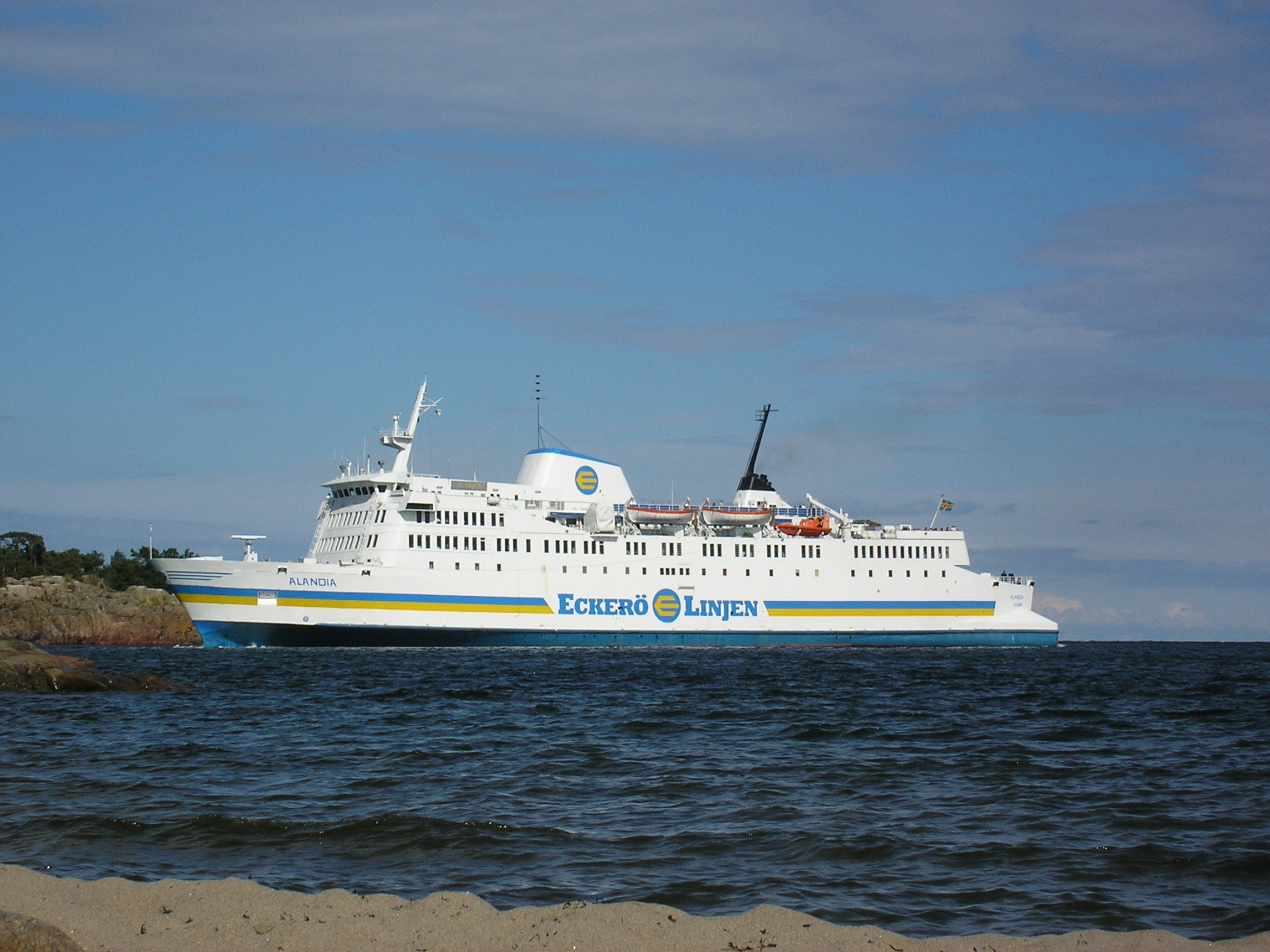 Dieses Bild zeigt die Fähre Alandia der Reederei Rederiaktiebolaget Eckerö Sonstiges